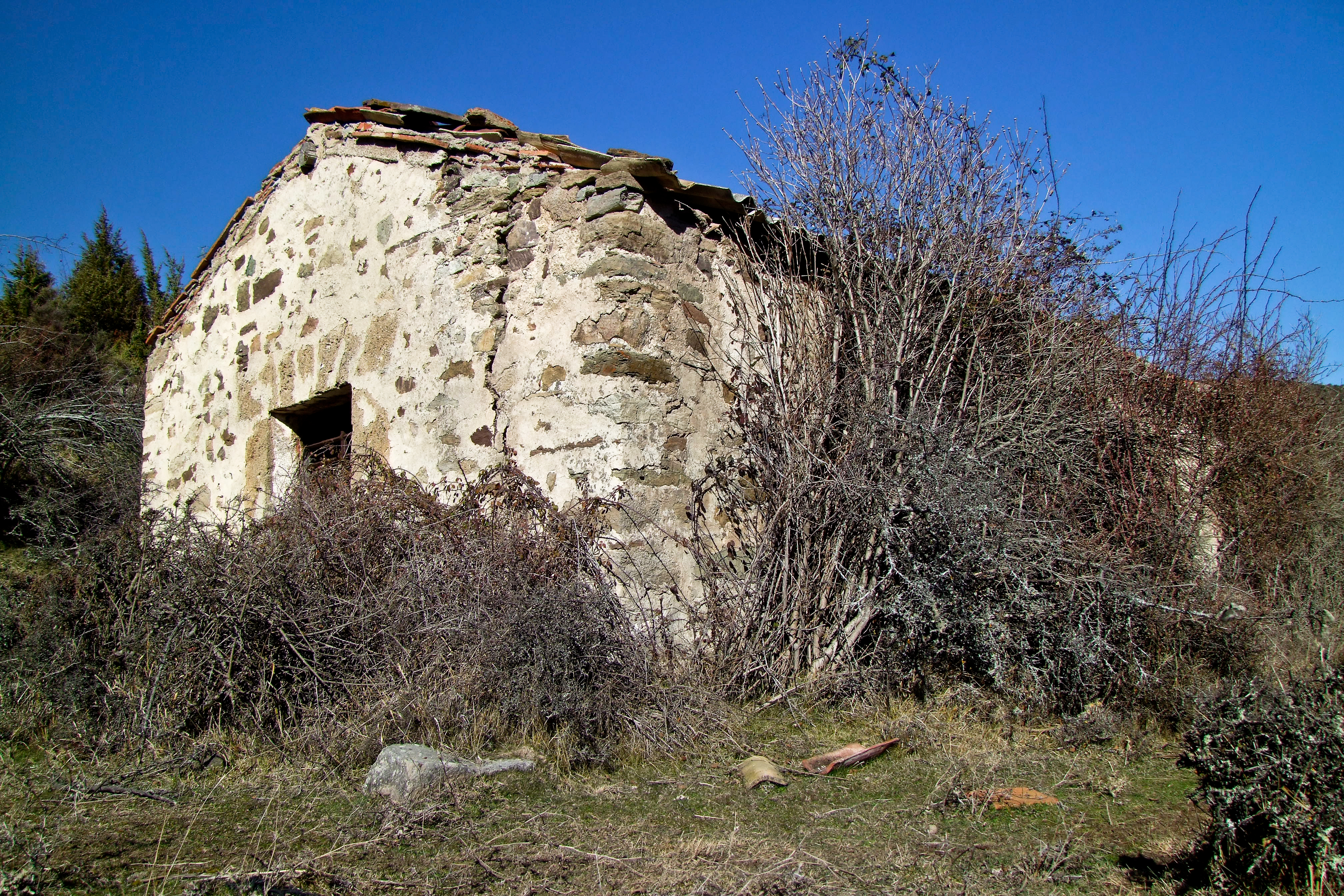 Ermita de Santiago en la localidad de Almarza de Cameros, La Rioja - España